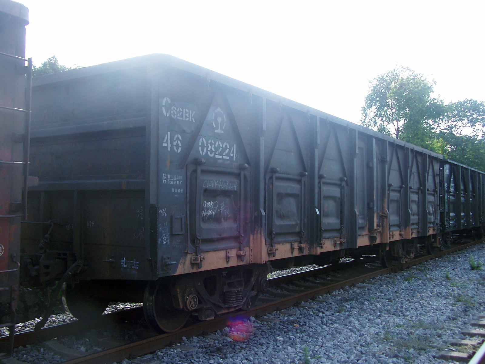 中国制造的C62BK型敞车